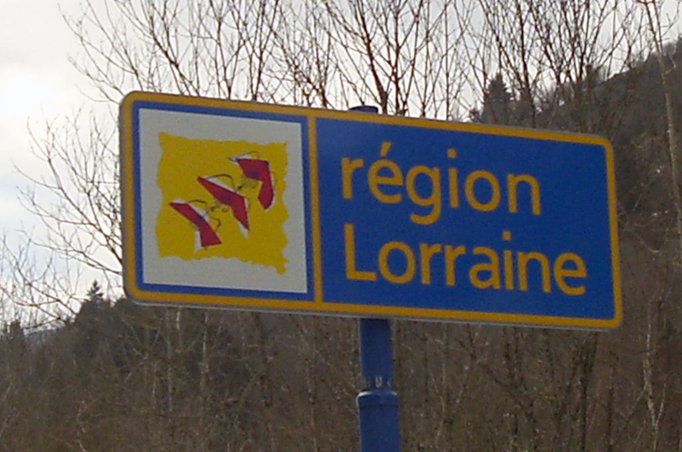 Le signe d'entrée de l'ancienne région de Lorraine